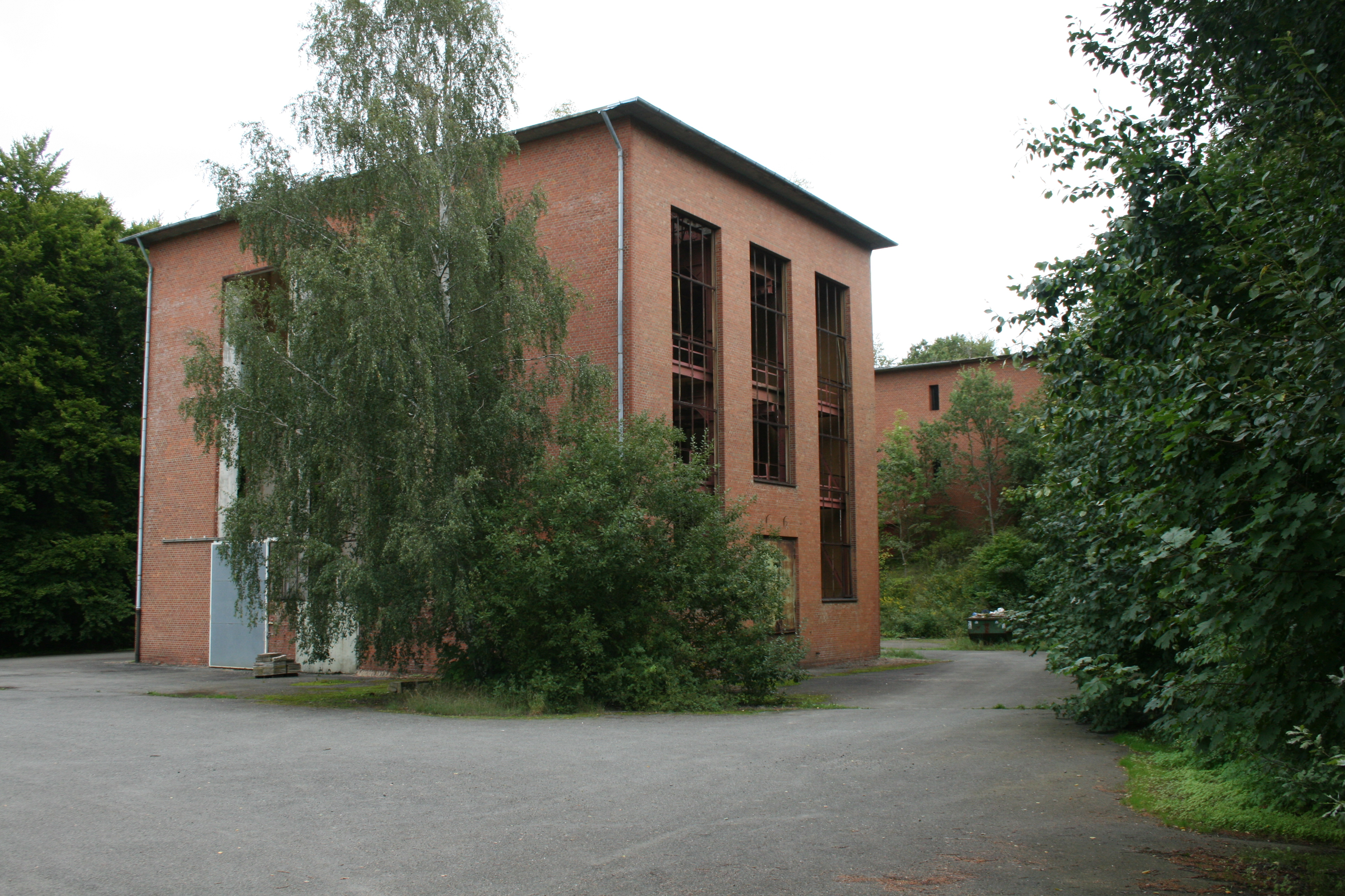 Schachthalle und Fördermaschinenhaus des Schachtes Fortuna 2 in Groß Döhren